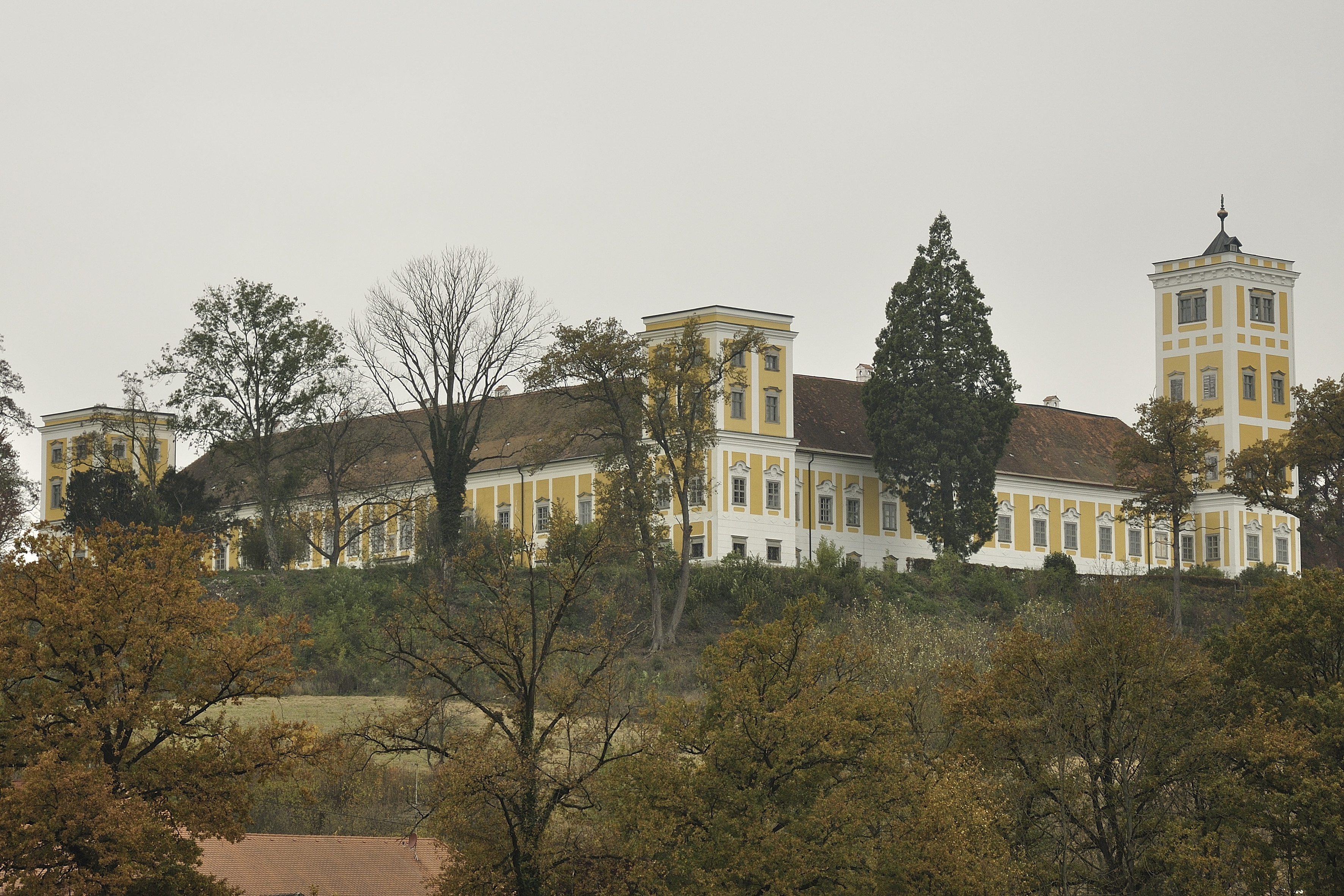 Schlossanlage Tillysburg, von Volkersdorf aus gesehen